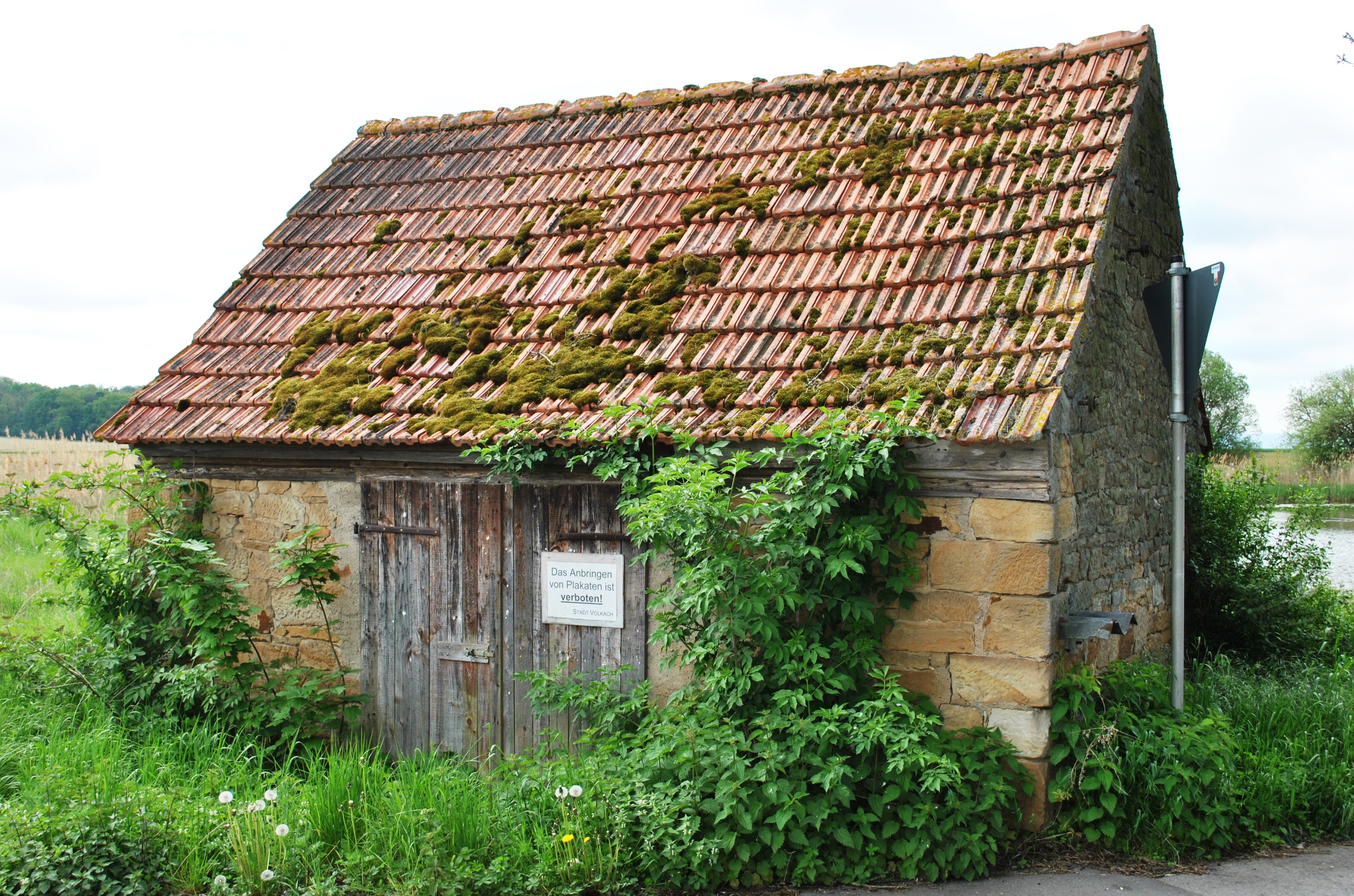 Flachsbrechhaus Kleiner Satteldachbau aus unverputztem Bruchsteinmauerwerk, Sandstein, zweite Hälfte 19. Jahrhundert D-6-75-174-1